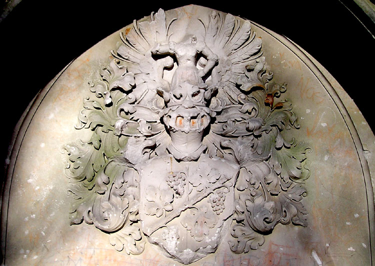 Herb rodziny von Blumennthal na ścianie frontowej ruiny kościoła w Pargowie